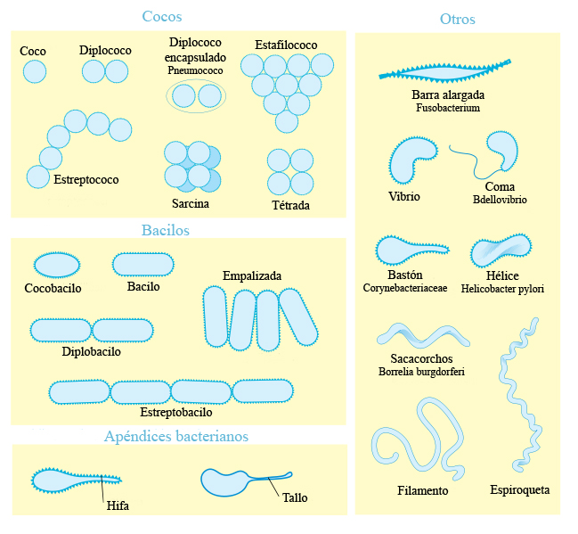 Esquema de las diversas morfologías que pueden presentar las bacterias.